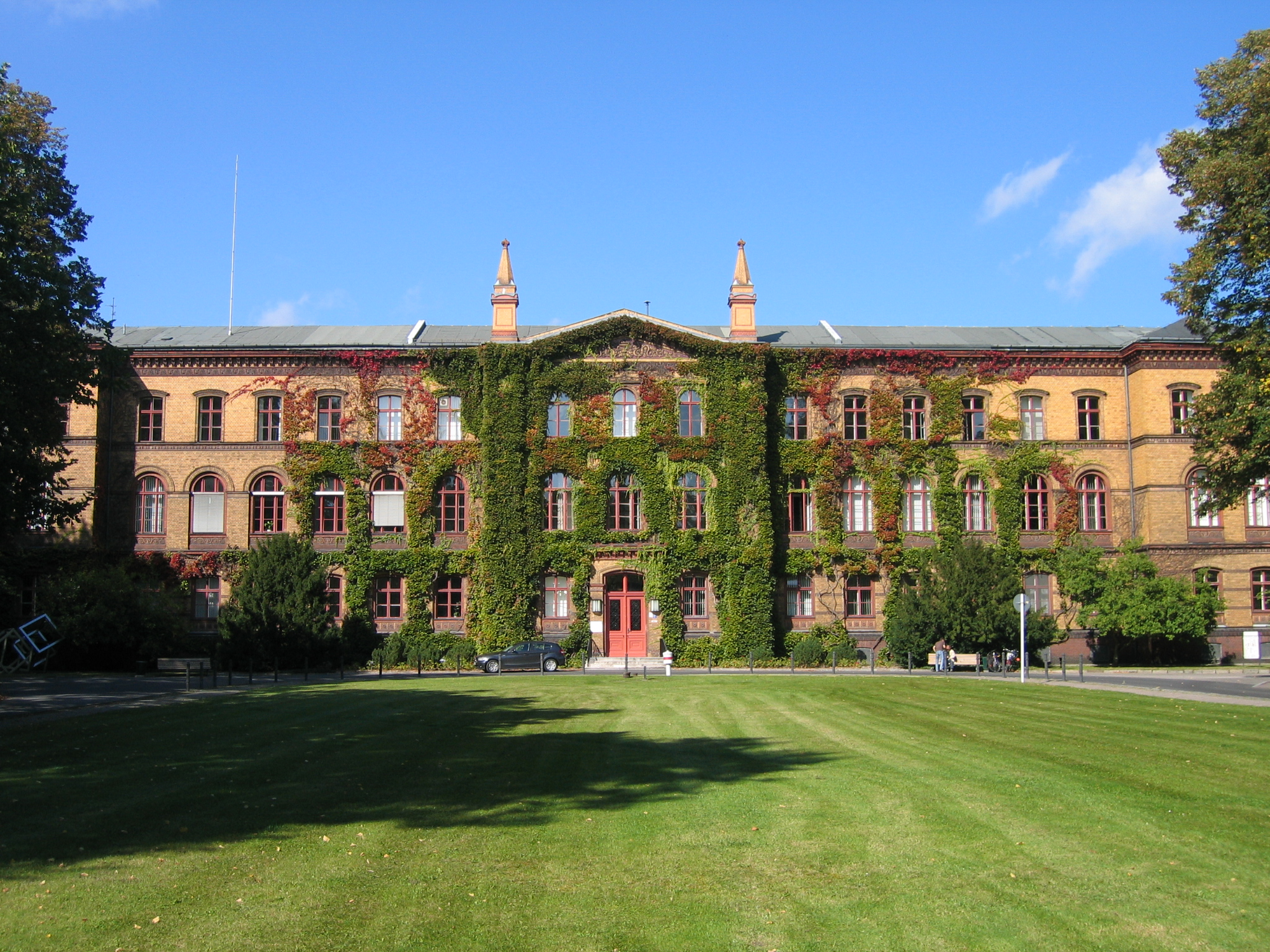 Karl-Bonhoeffer-Nervenklinik, Verwaltungsgebäude aus dem 19. Jahrhundert